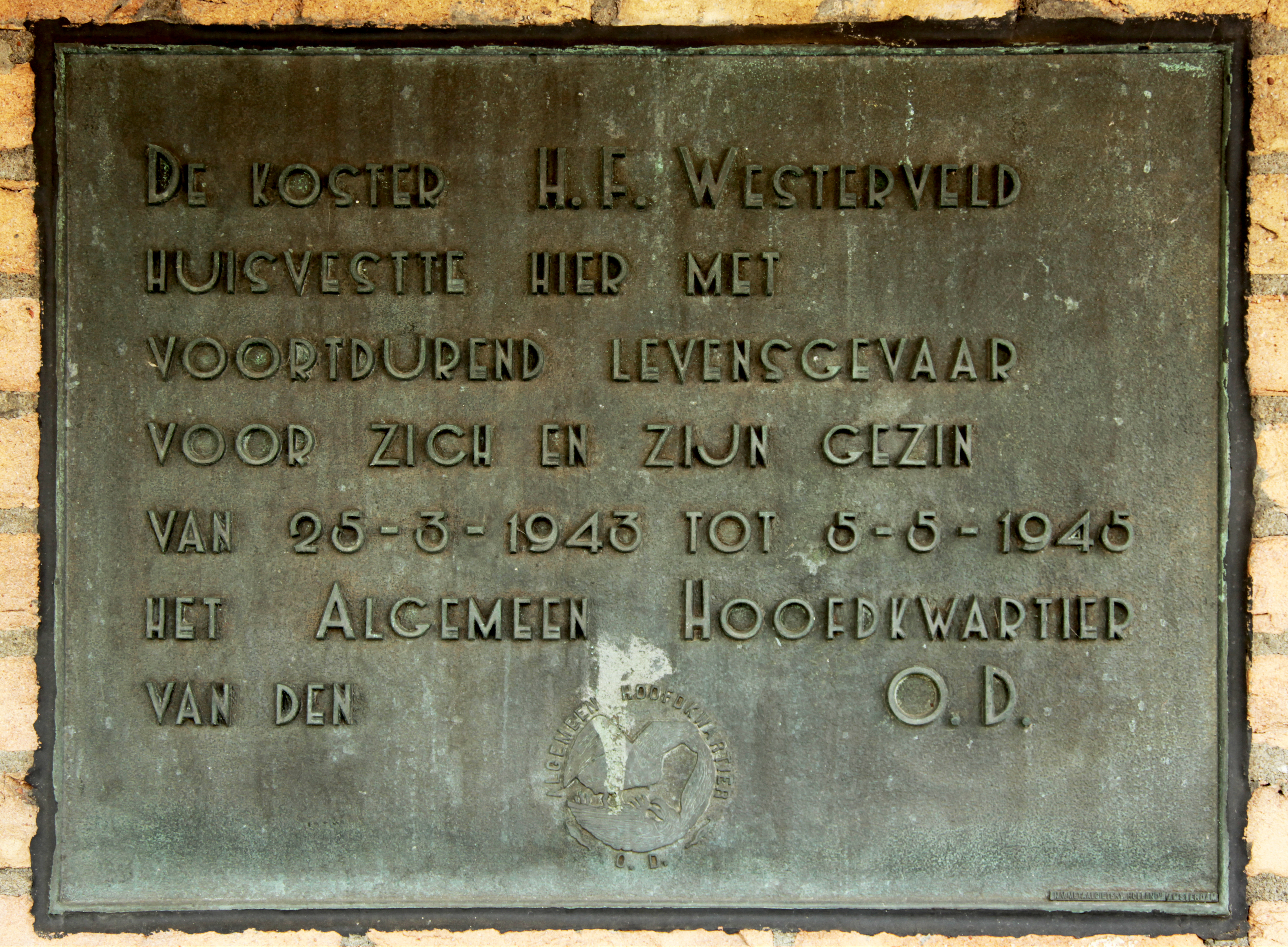 Plaquette van het monument aan de Stadhouderskade 12, Marriott Hotel